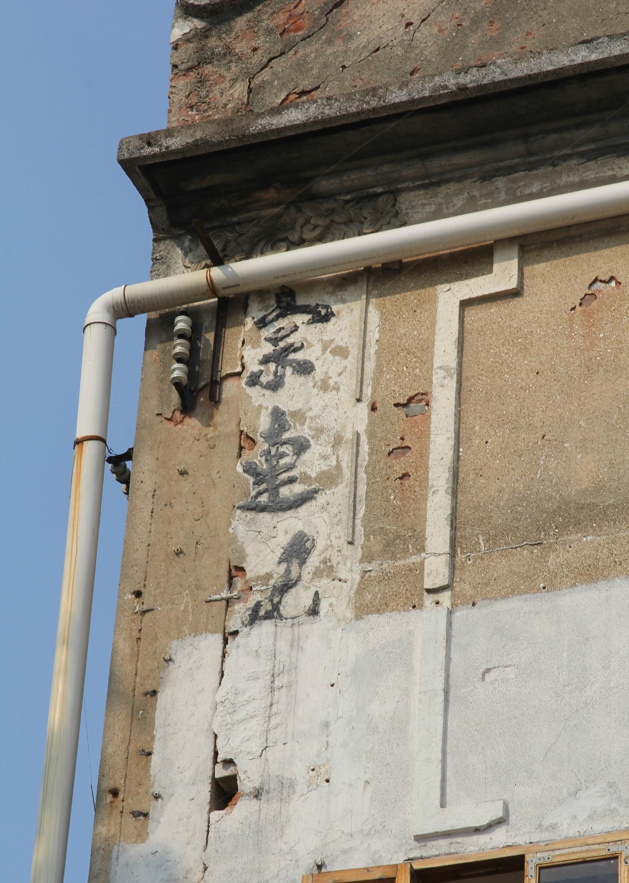 粵語: 鳳凰崗 誠志倉